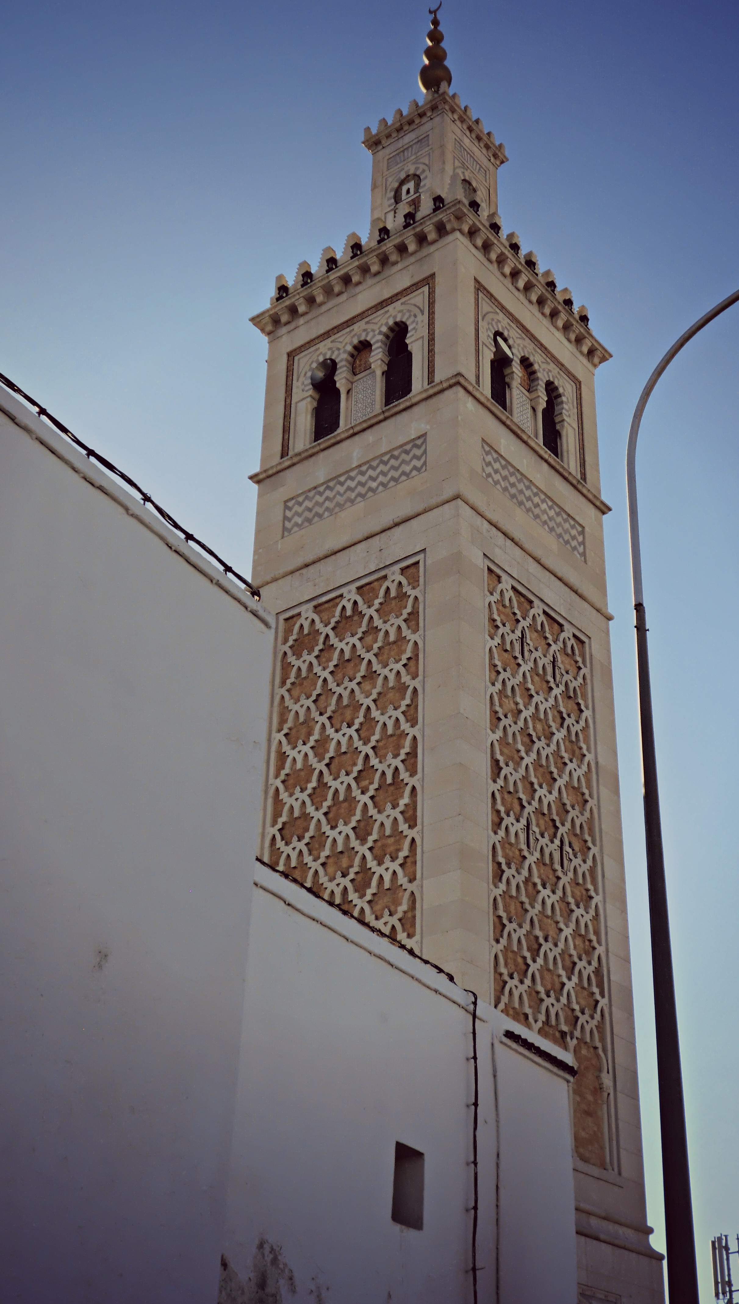 Mosquée de Bab-Dzira, Tunis